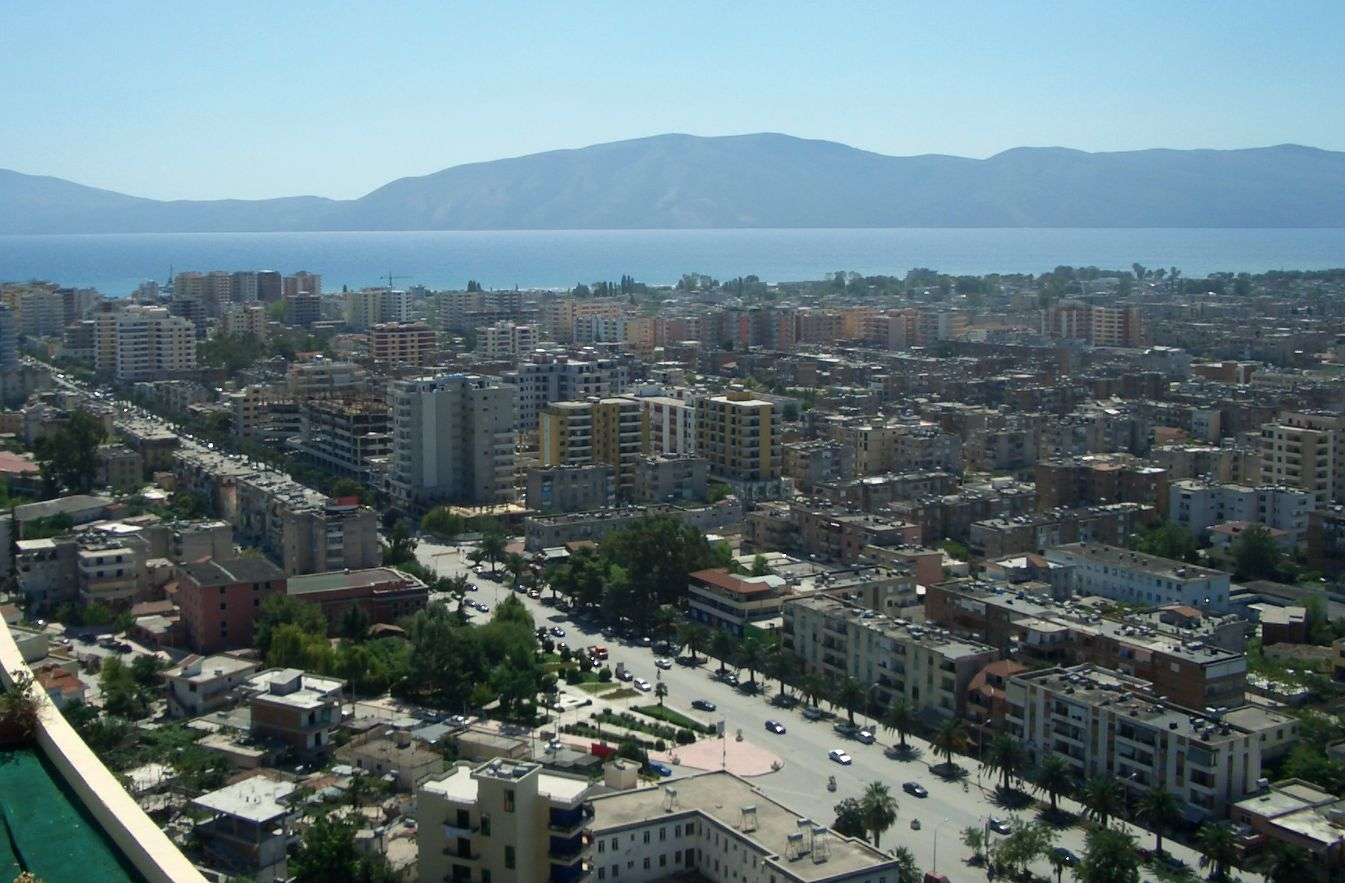 Vlora Blick auf den Hauptboulevard